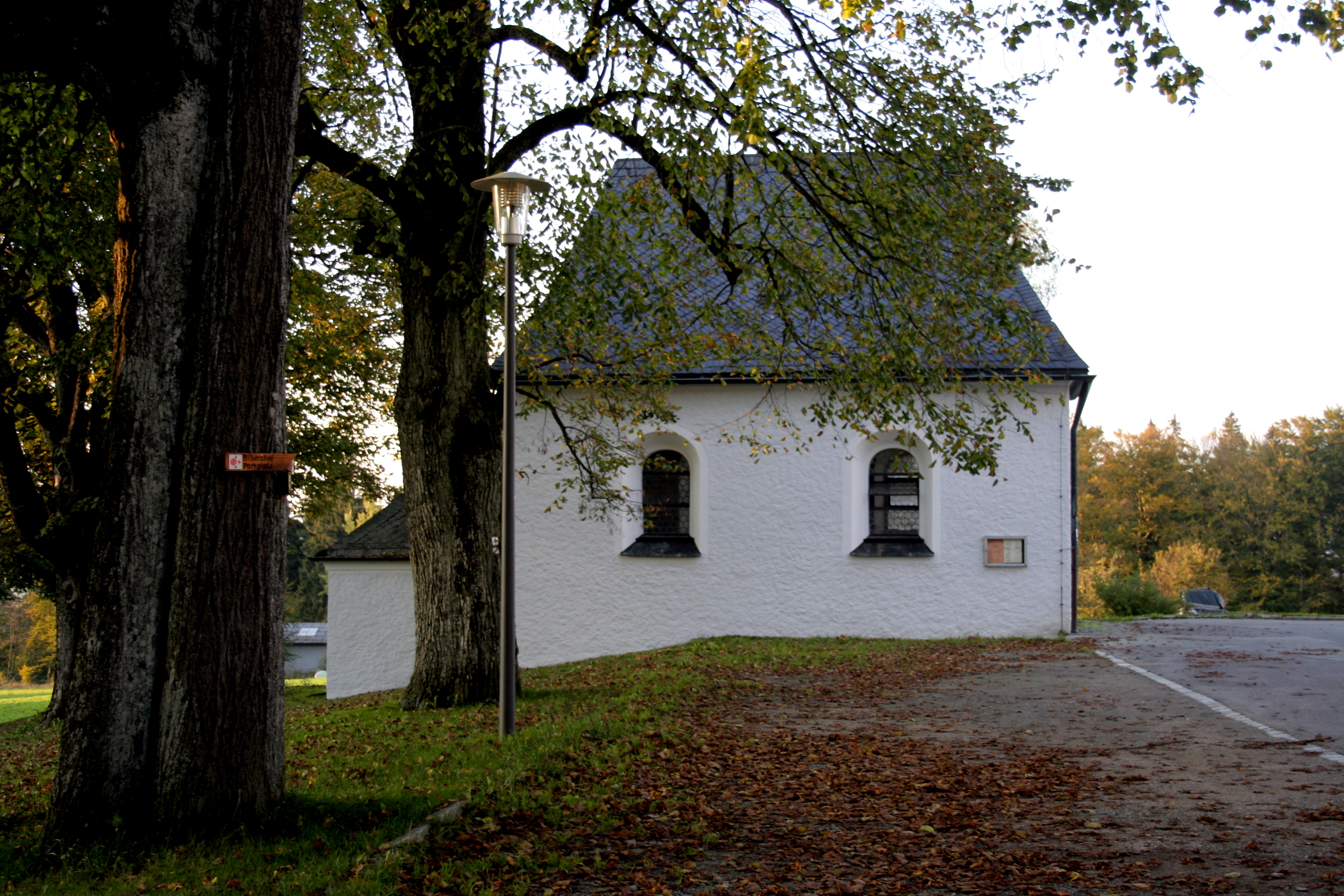 Baudenkmal Deutschland; Bayern; Oberpfalz; Neustadt a.d.Waldnaab; Waldthurn, Oberfahrenberg; Dreifaltigkeitskapelle, Walmdachbau über rechteckigem Grundriss mit Eingangsvorhalle nach Westen, 1706.This is a photograph of an architectural monument.